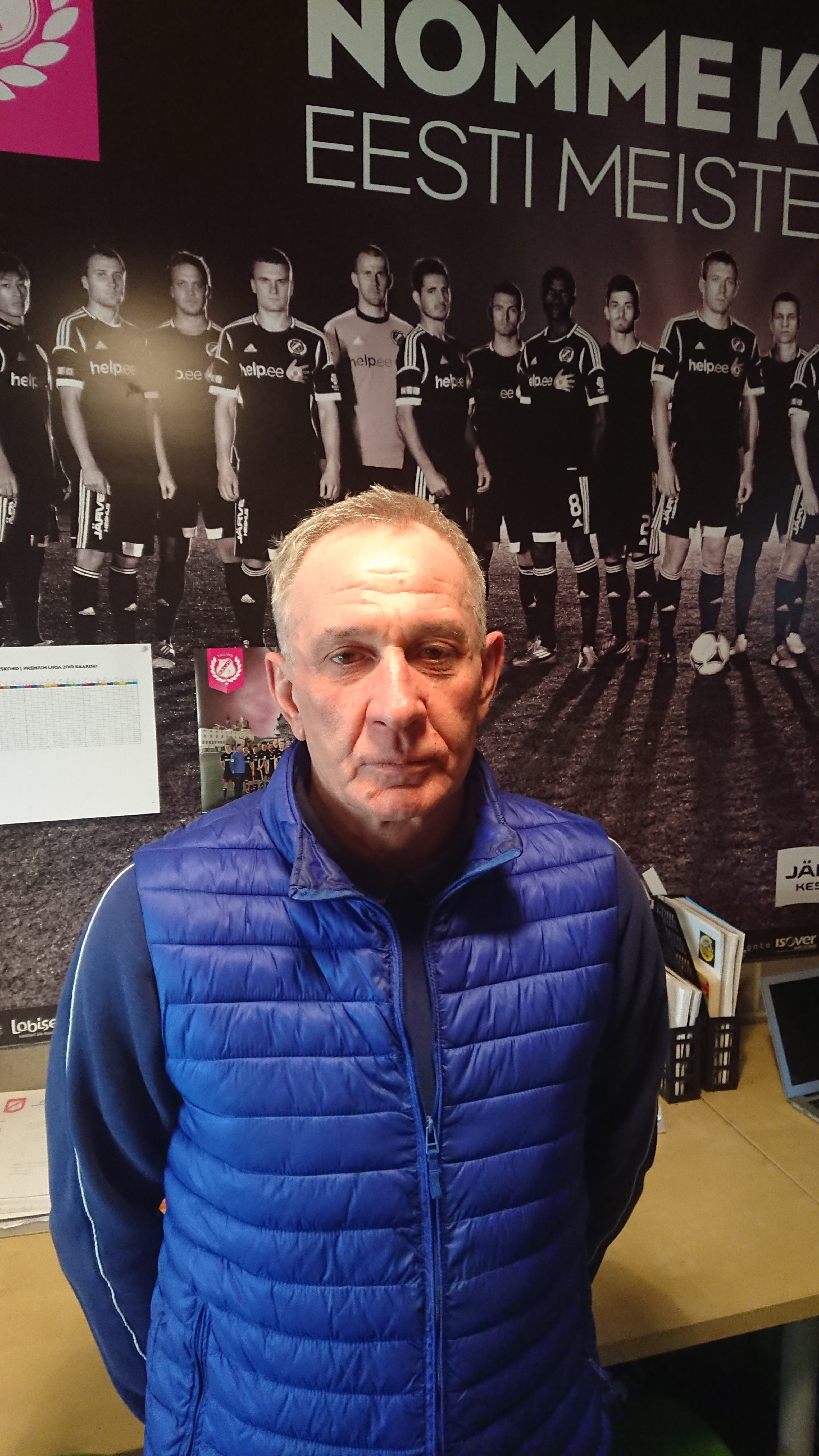 Сергей Францев - футбольный тренер